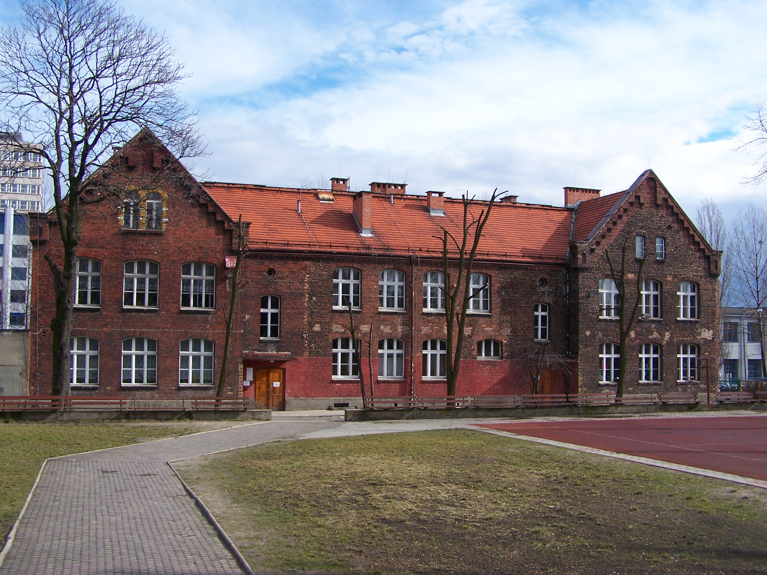 Szkoła Podstawowa nr. 17 im. Tadeusza Kościuszki na Józefowcu w Katowicach.